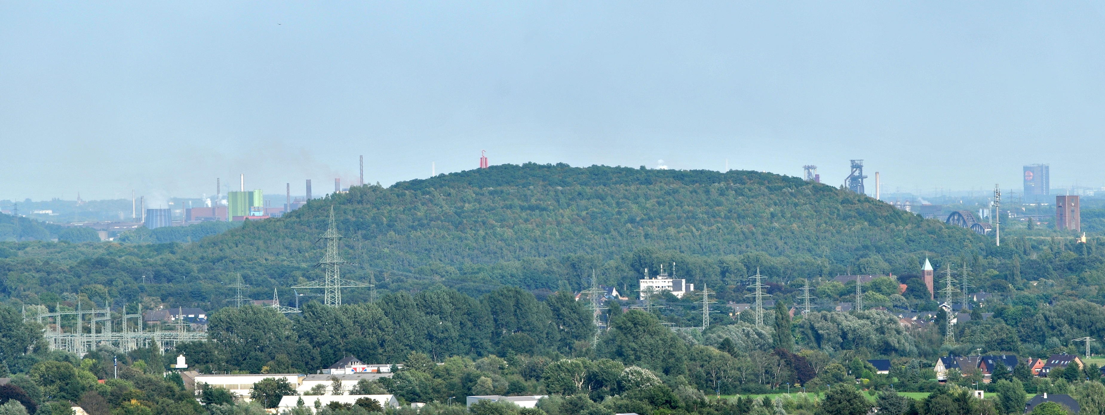 Panorama der Halde Rheinpreußen von der Halde Norddeutschland aus gesehen; links Umspannanlage Utfort, hinten rechts Gasometer Oberhausen